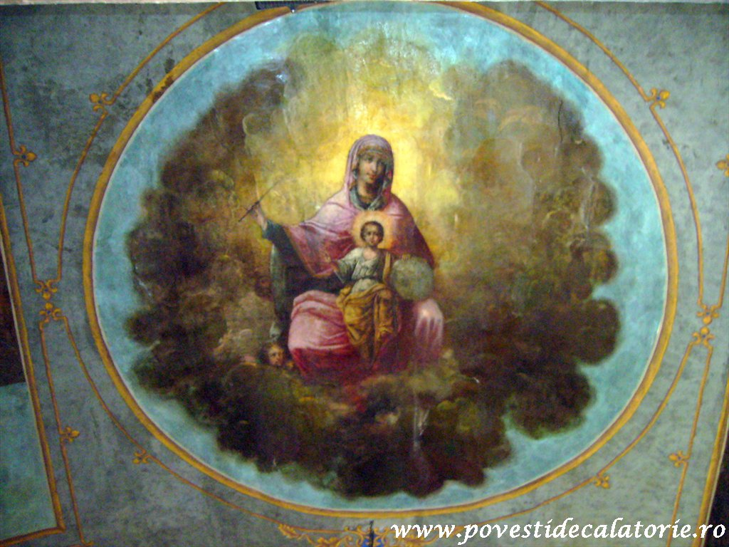 Pictura de la Puchenii Mari